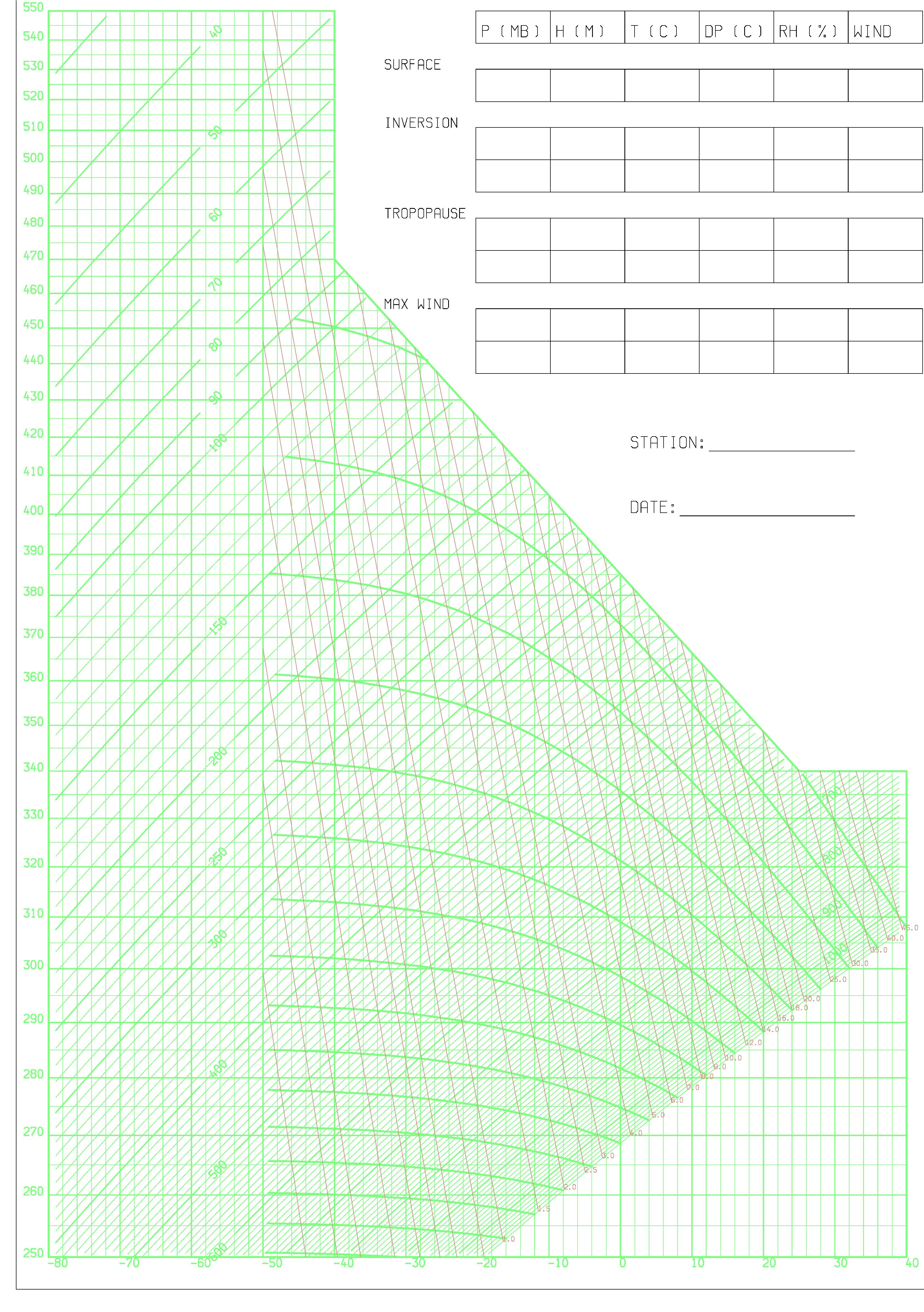 טפיגרמה של השירות המטאורולוגי הישראלי